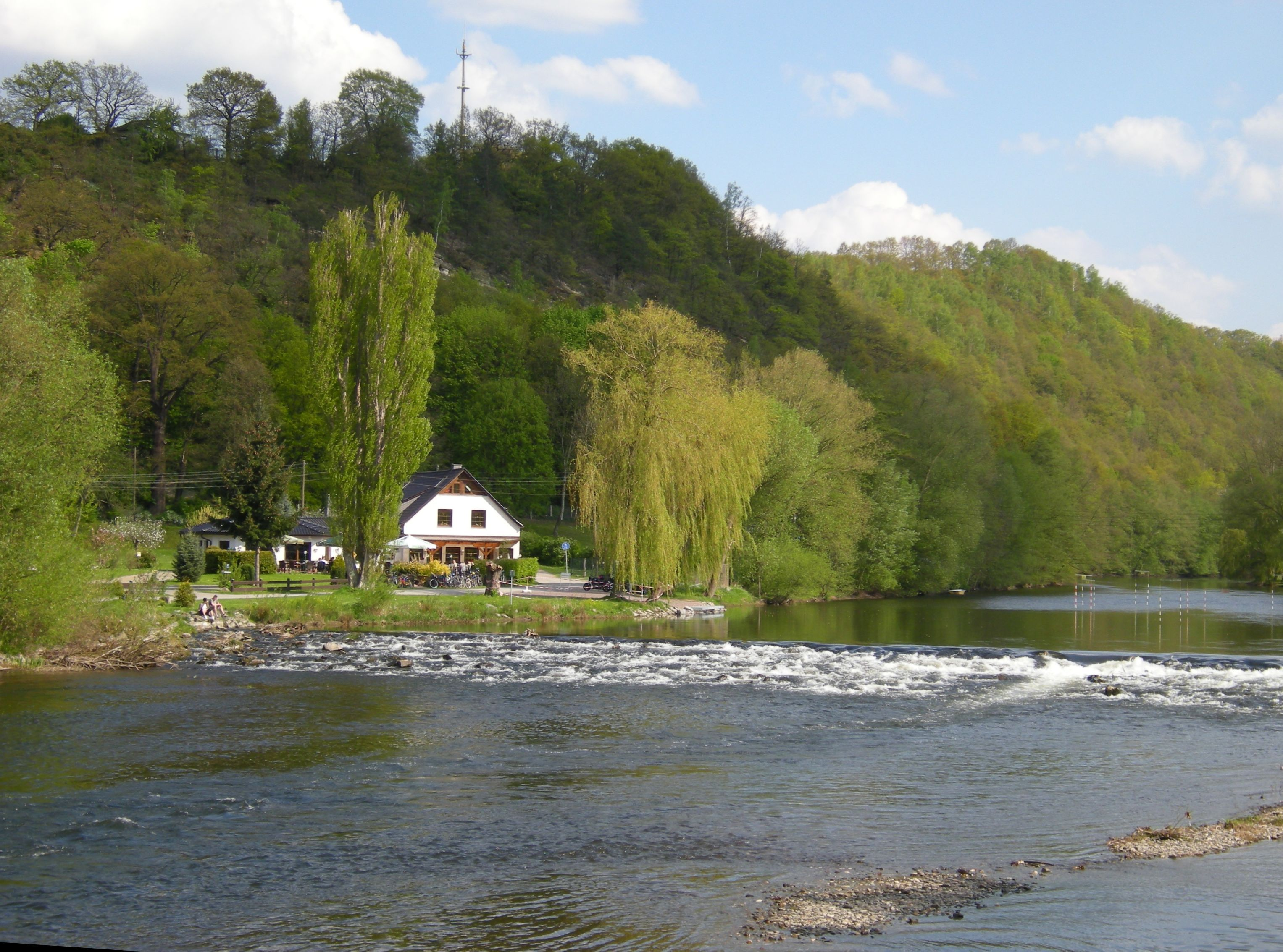 Rudolstadt - Saaletal.jpg